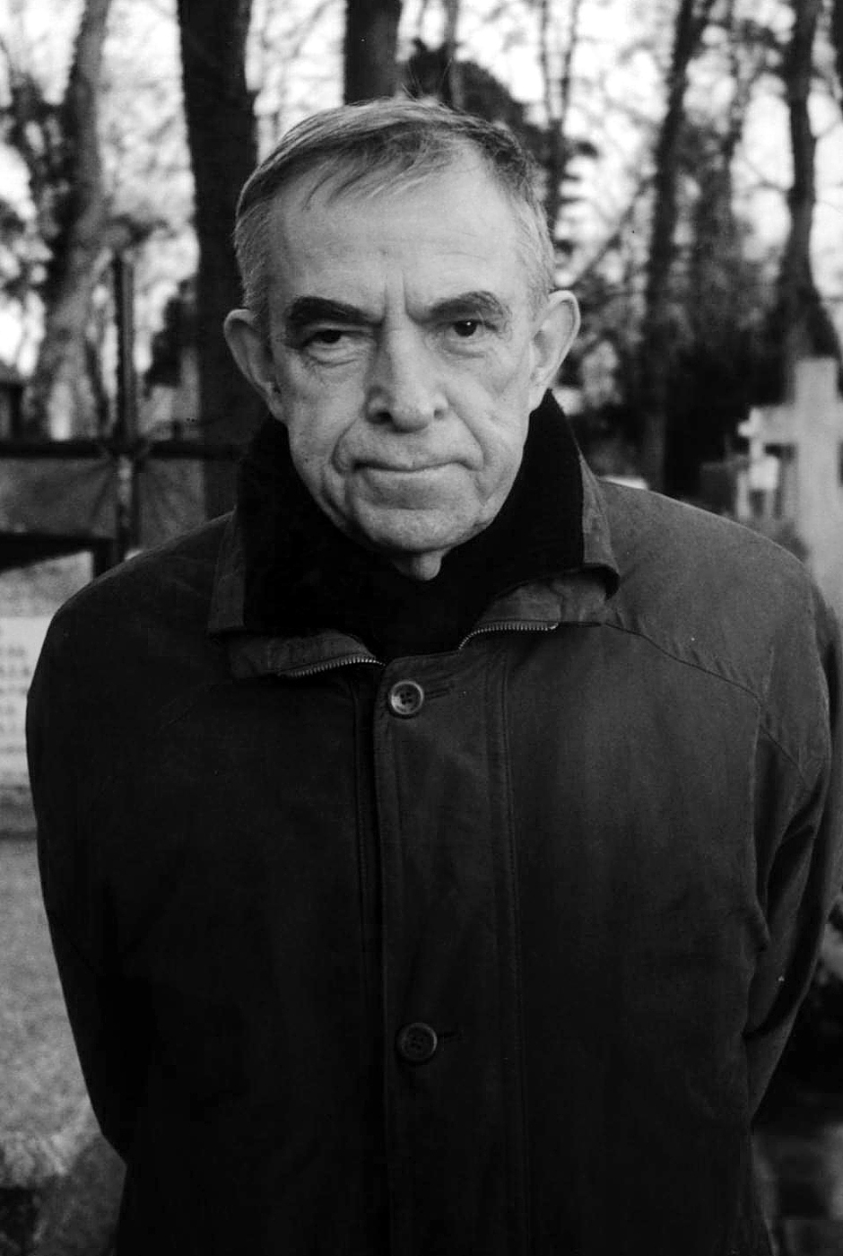 Henryk Bereza, krytyk literacki